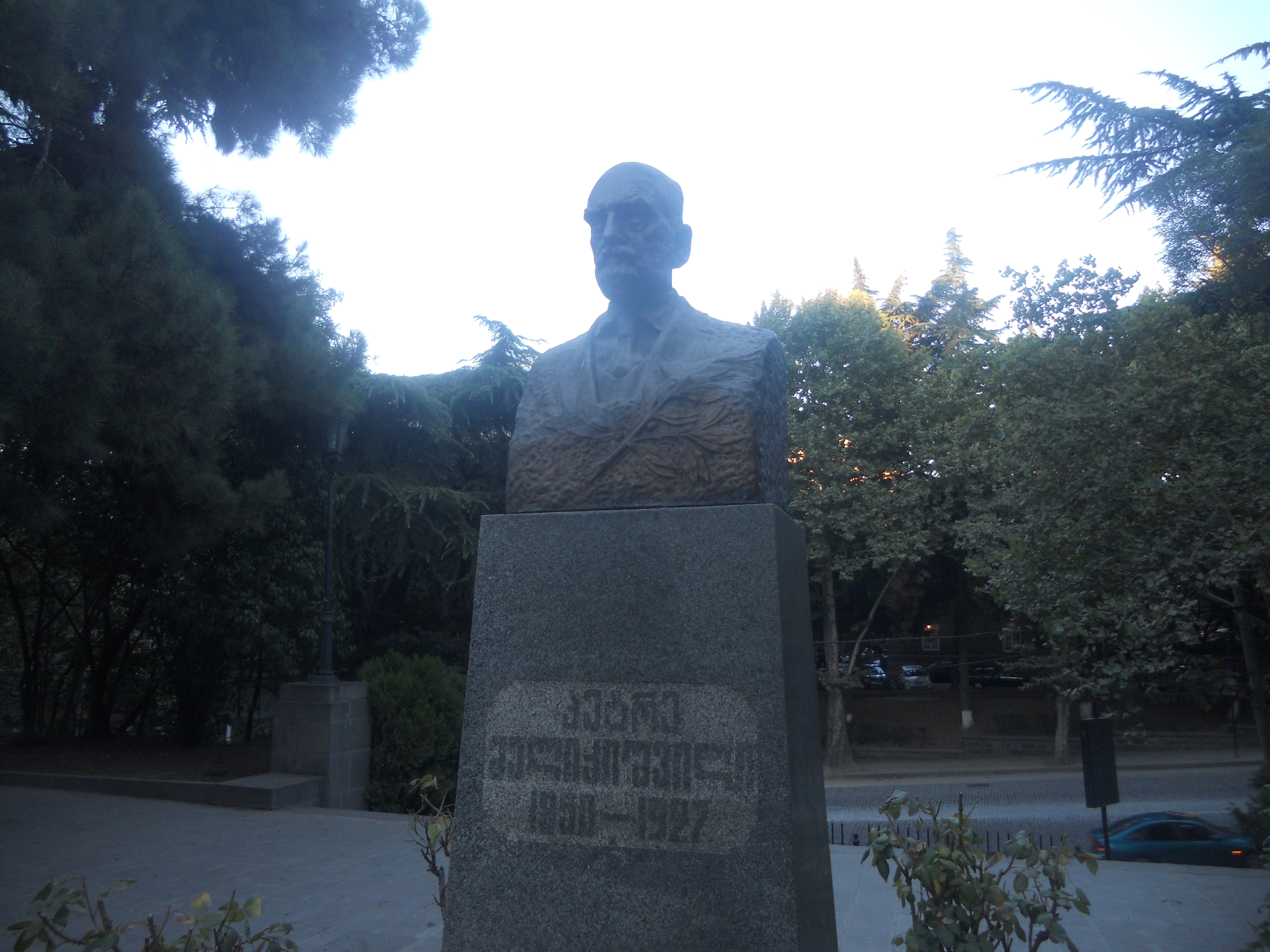 სახელმწიფო უნივერსიტეტის I კორპუსი